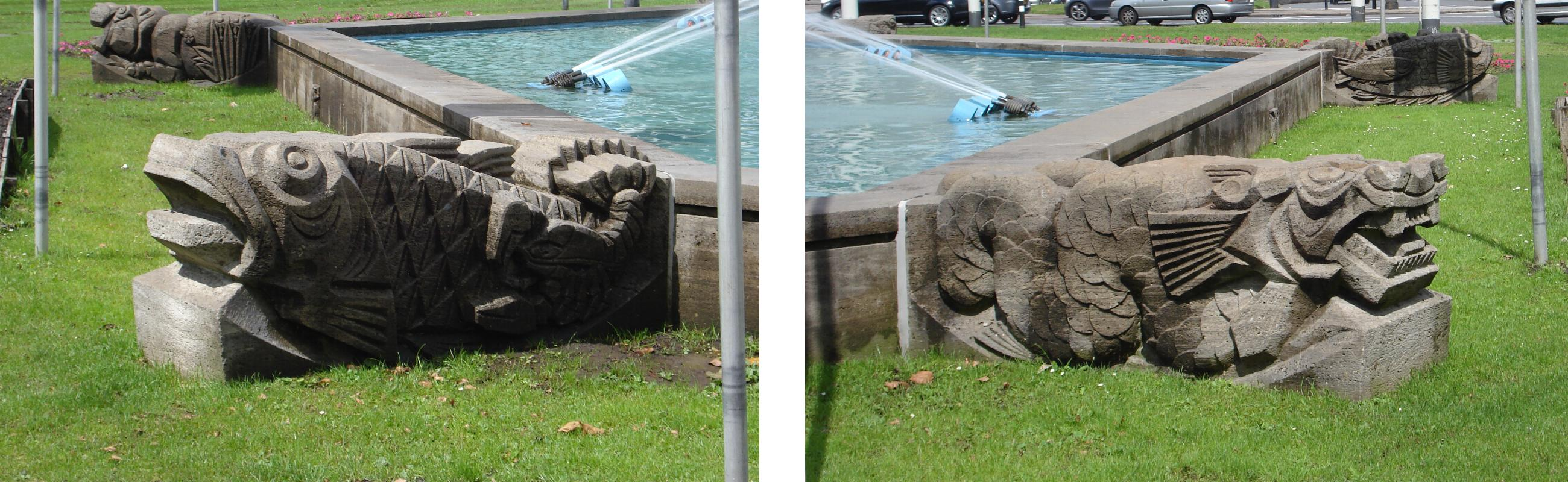 Rotterdam, hofplein. Kunstwerk "Waterdieren" van Cor van Kralingen. Rotterdam/The Netherlands.